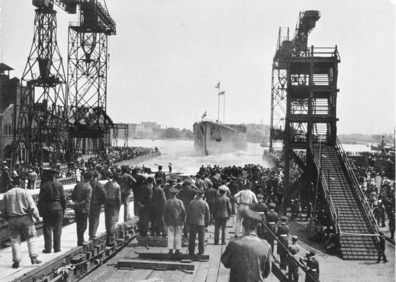 Scherl: Stapellauf des grossen Kreuzers Hindenburg. 1721-36 Information added by Wikimedia users.